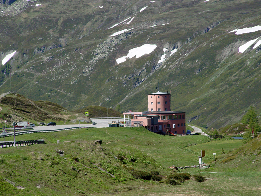 Simplon Pass